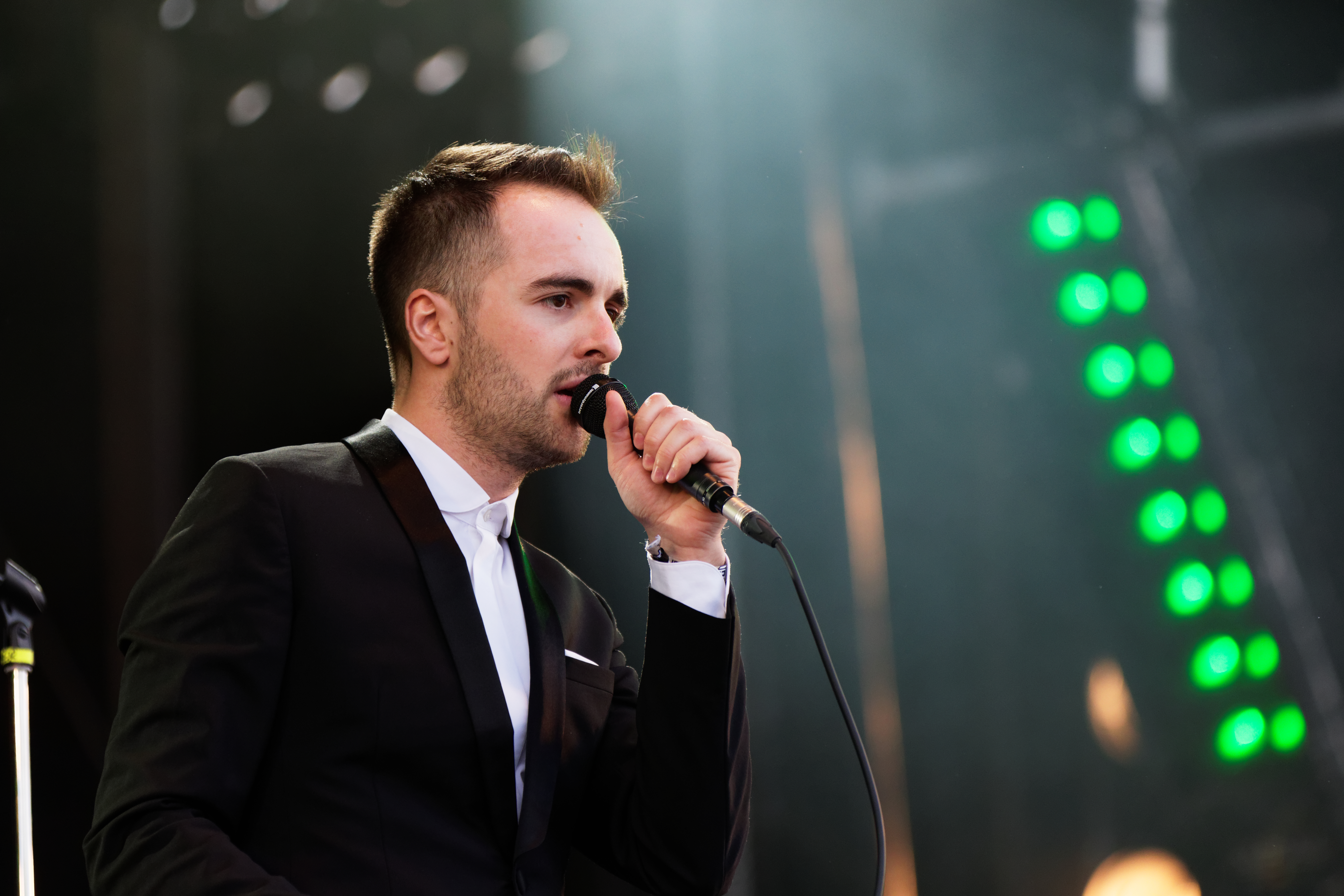 Her en concert lors du festival des vieilles charrues 2016.